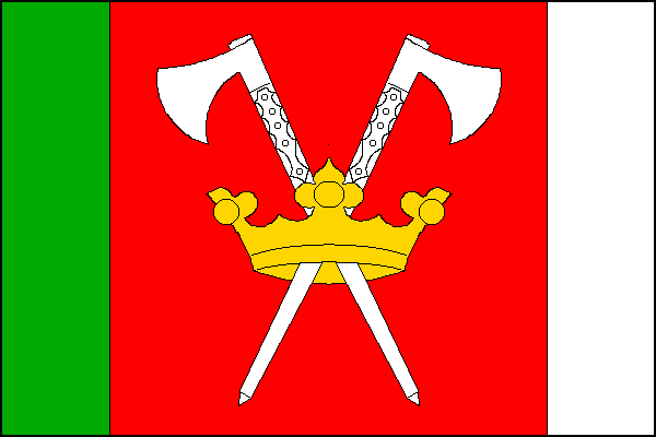 vlajka,Hošťka , okres Tachov